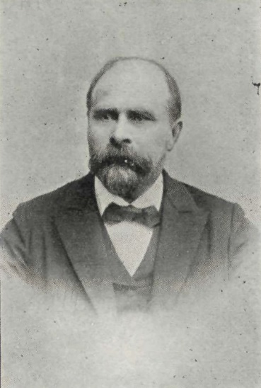 Føroyskt: Fríðrikur Petersen (1853–1917), løgtings- og landstingsmaður og próstur á Nesi.